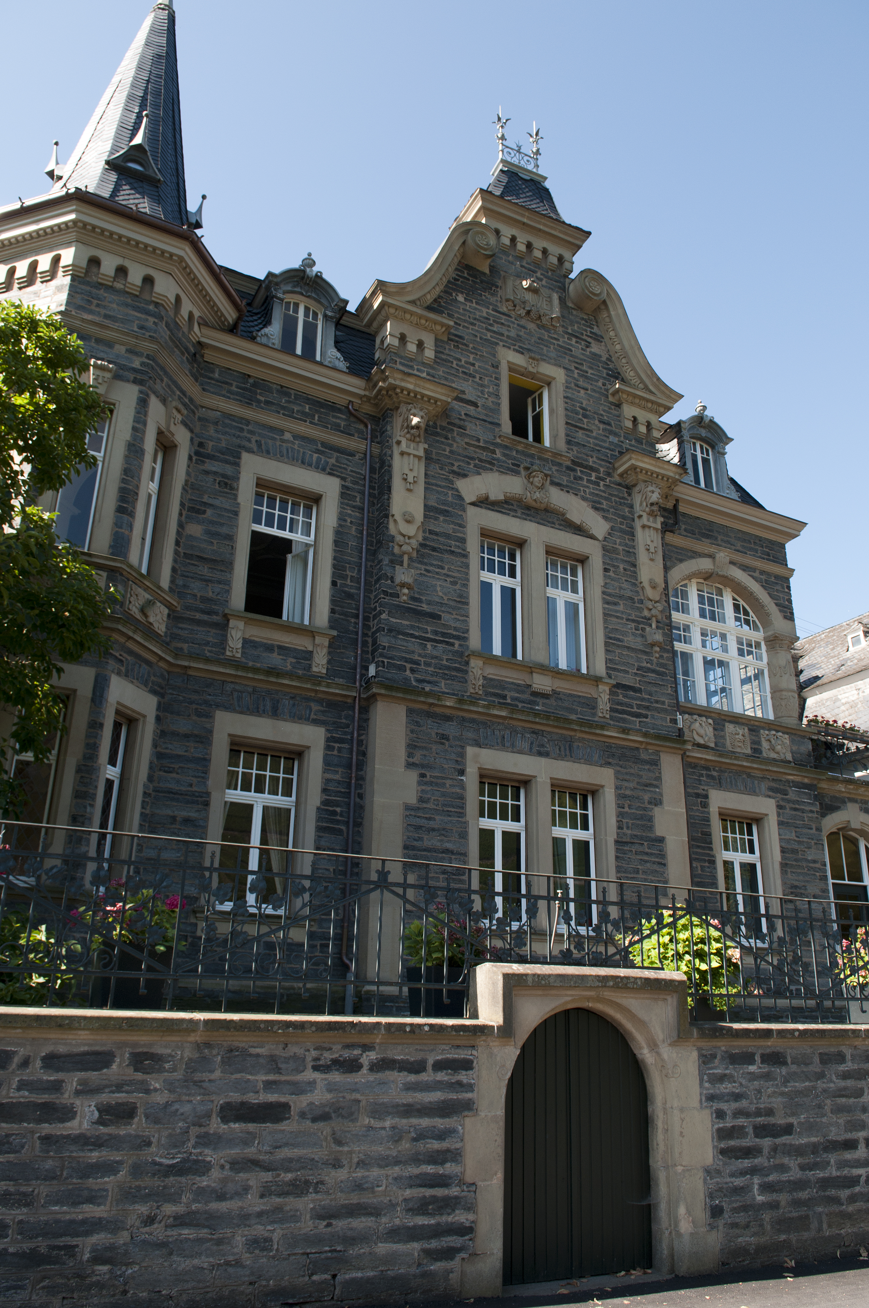 J.J.Prüm, Gebäude in Bernkastel-Kues